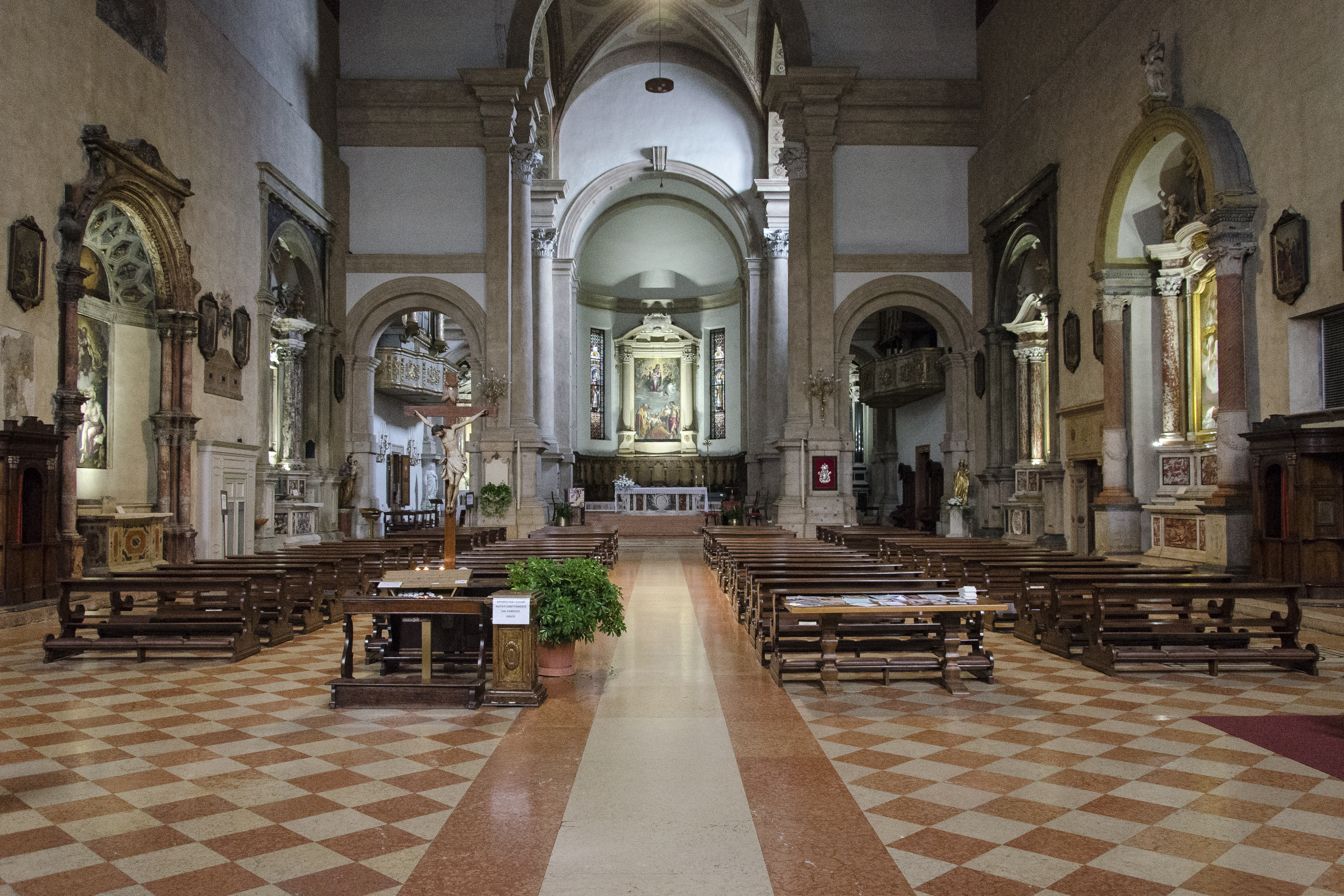 Veduta dell'interno